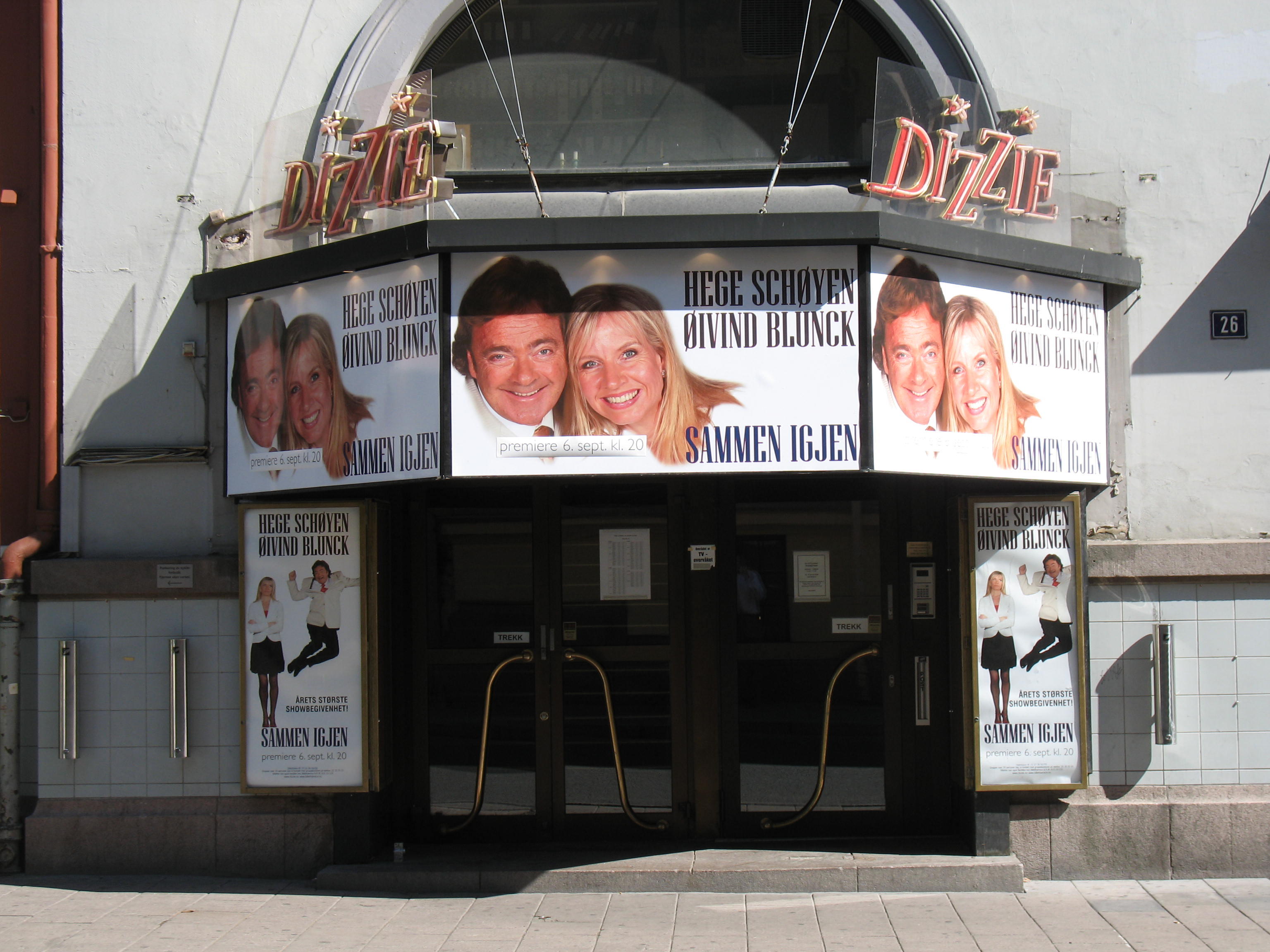 Dizzie Showteater i Universitetsgaten i Osli